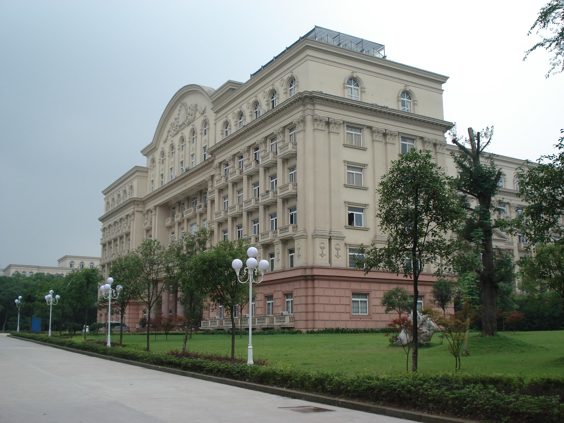 西南大學南區33教學樓